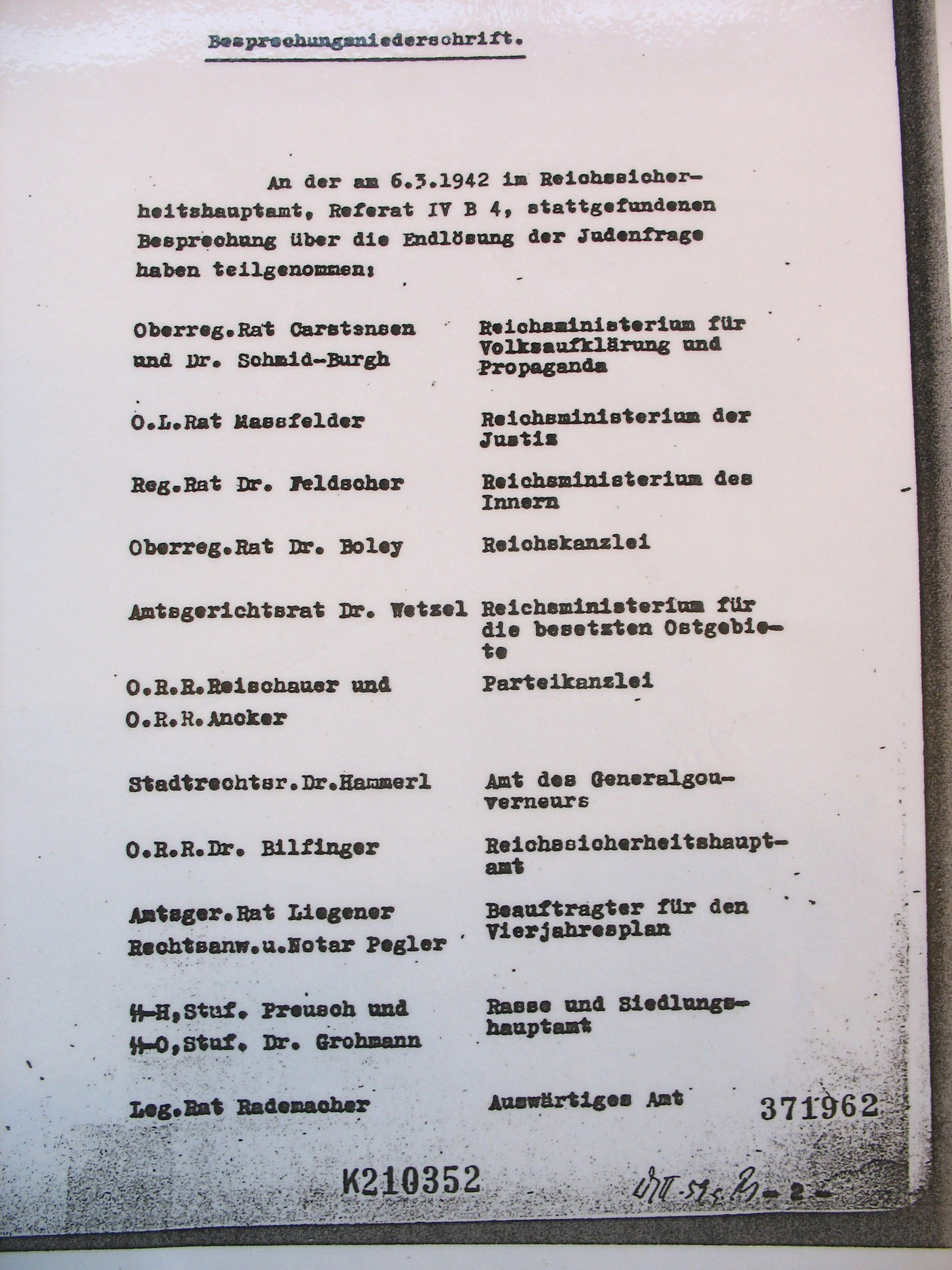 Konferenzprotokoll Teilnehmerliste Reichssicherheitshauptamt Endlösung der Judenfrage 6. März 1942. Personen: Pay Carstensen *; Schmidt-Burgh (recte: Edgar Schmidt-Burgk (1902-1945)); Franz Massfeller; Werner Feldscher; Gottfried Boley *; Erhard Wetzel; Herbert Reischauer; Edinger Ancker; Hermann Hammerle *; Rudolf Bilfinger; Eberhard Liegener *; Konrad Pegler *; Hermann Preusch *; Josef Grohmann *; Franz Rademacher (Diplomat)Anmerkung: * Die gekennzeichneten Personen sind nicht in der deutschsprachigen Wikipedia angelegt, es gibt für sie jeweils einen Eintrag bei Klee, Personenlexikon, 2003